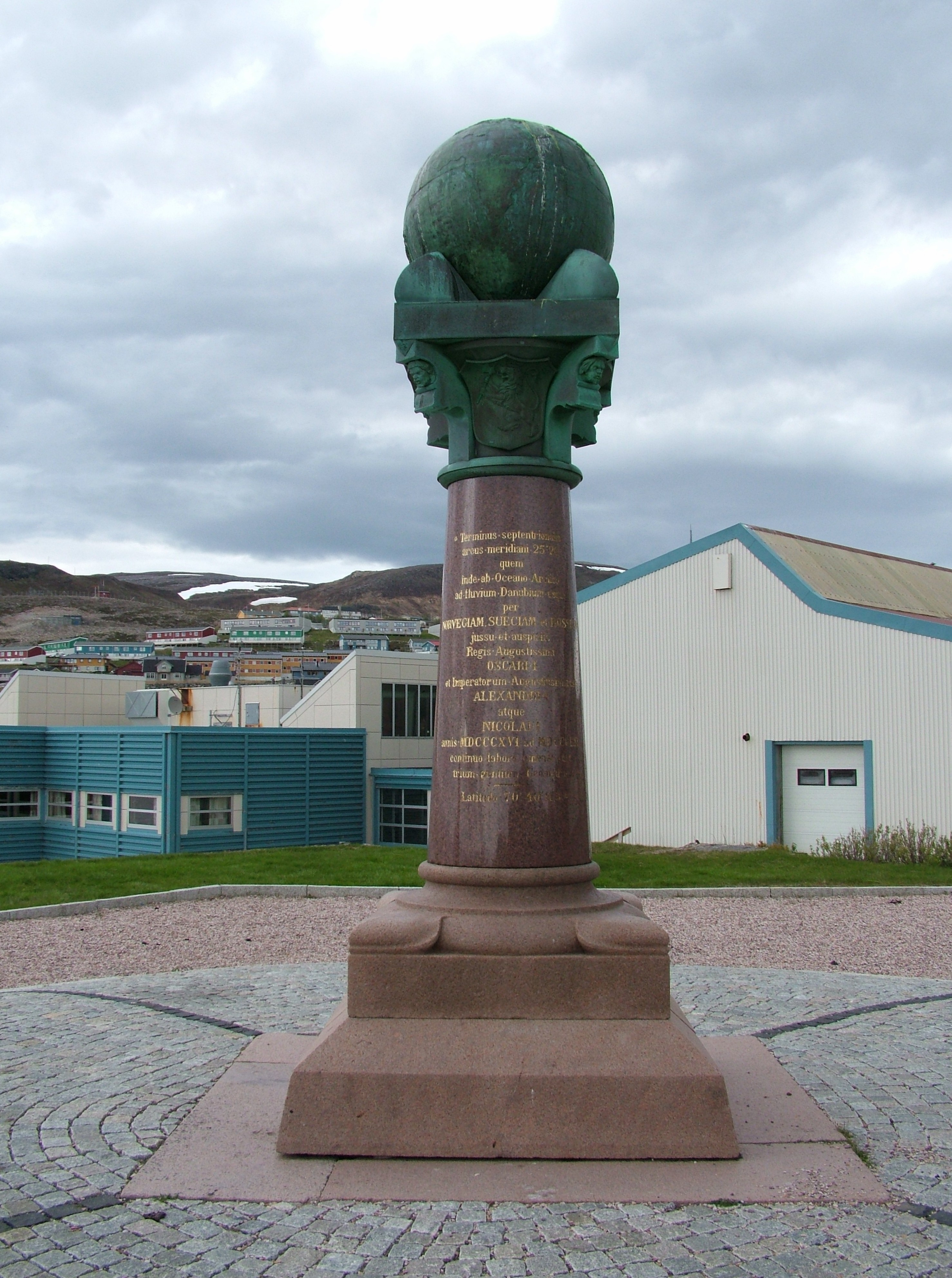 Estación más septentrional del arco en Fuglenes, Noruega.